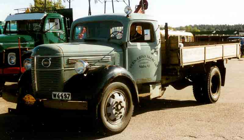 Volvo LV127 Truck 1943